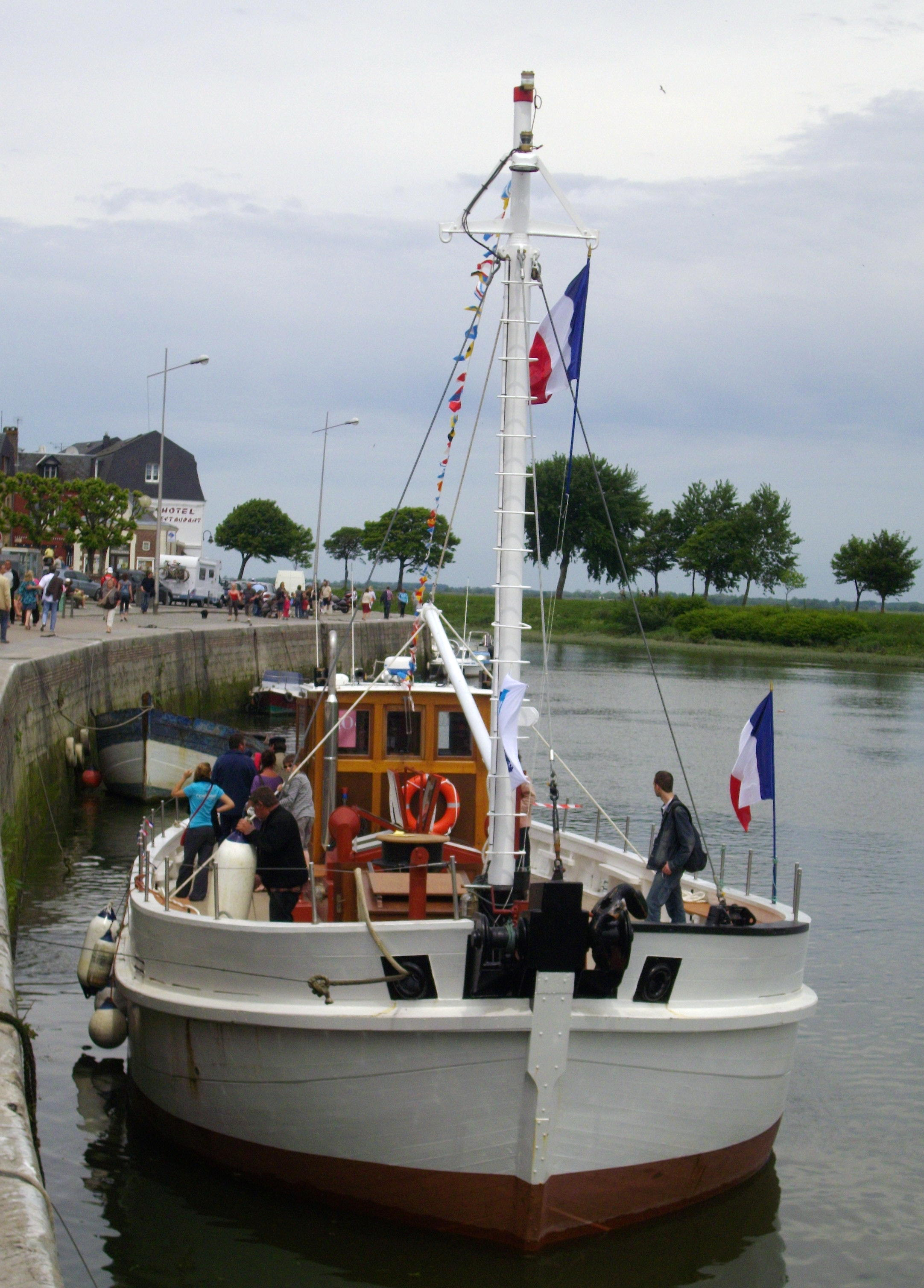 Le baliseur Somme II à Saint-Valéry-sur-Somme